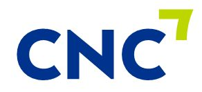 CNC logo